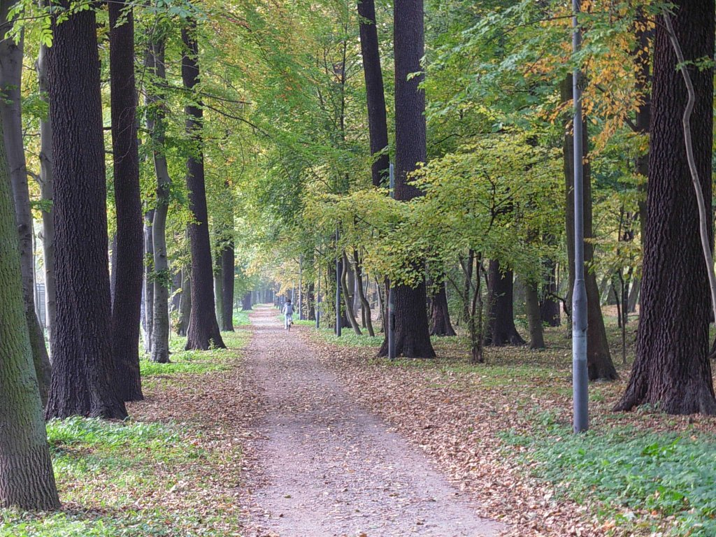 Planty nad kanałem bydgoskim